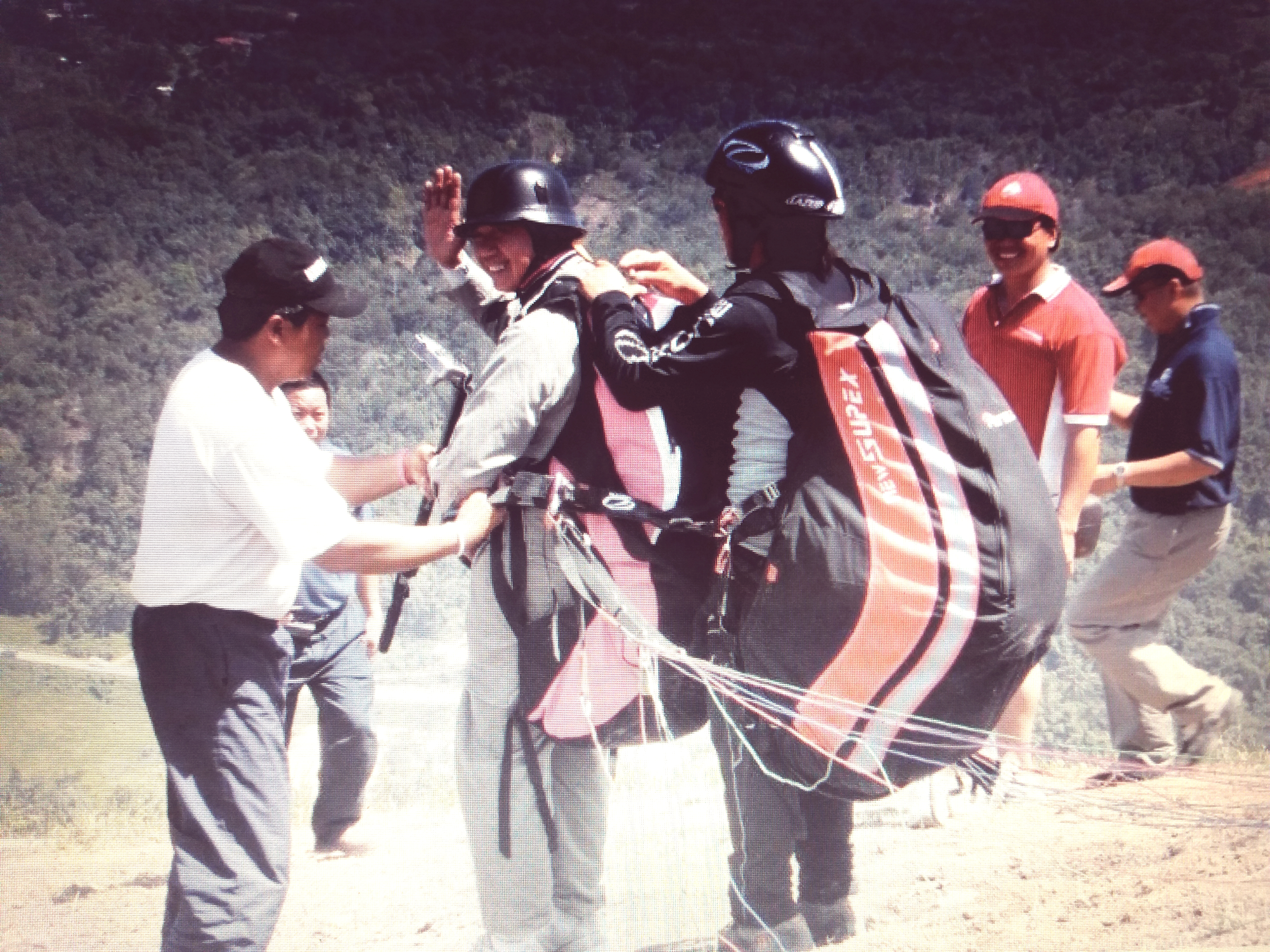 Yang Berhormat Datuk Jahid Jahim dibantu oleh ahli peluncur sebelum melakukan aktiviti sukan meluncur udara